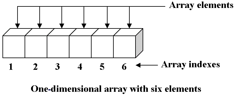 Ühedimensionaalne kuue liikmega massiiv